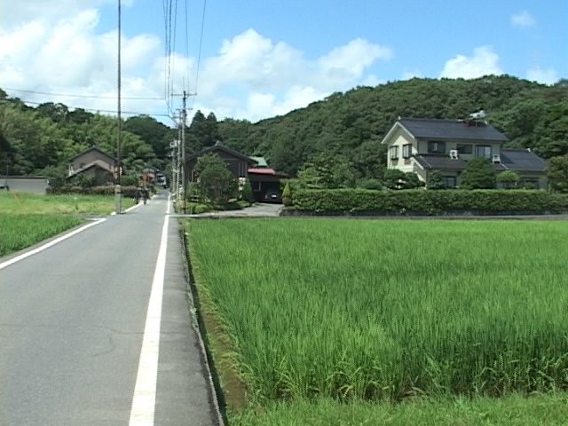 Uyama castle,Tottori-city